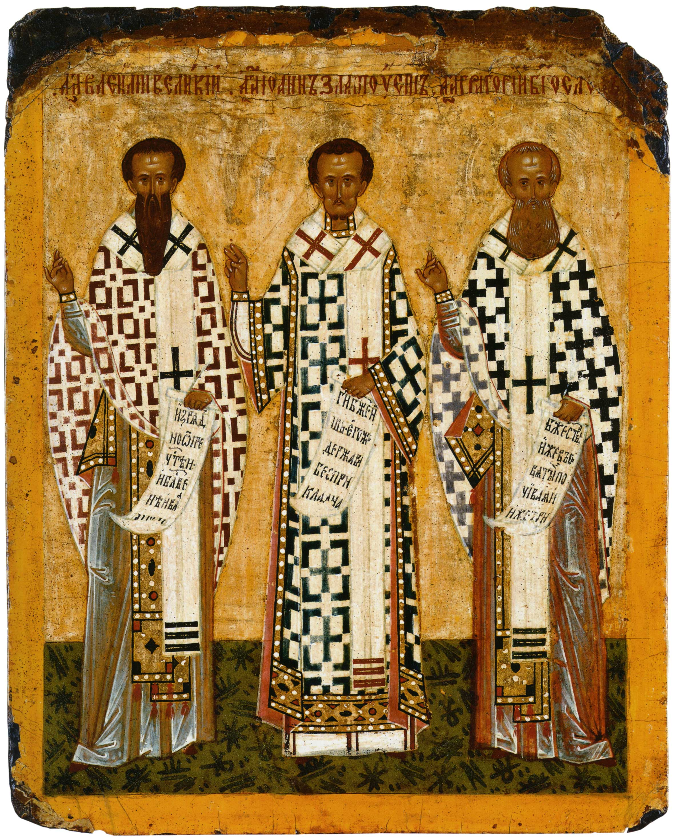 Василий Великий, Иоанн Златоуст, Григорий Богослов Двусторонняя икона-таблетка Школа или худ. центр: Новгород Конец XV — начало XVI вв. Иконы Великого Новгорода 2008: Конец XV в. (1484–1504 годы) Трифонова 2013: Конец XV в. 24 × 19.5 см Новгородский гос. историко-архитектурный и худо­жест­вен­ный музей-заповедник, Новгород, Россия Инв. 3099 Входит в серию таблеток из собора Св. Софии в Новгороде. Оборот — Сретение.